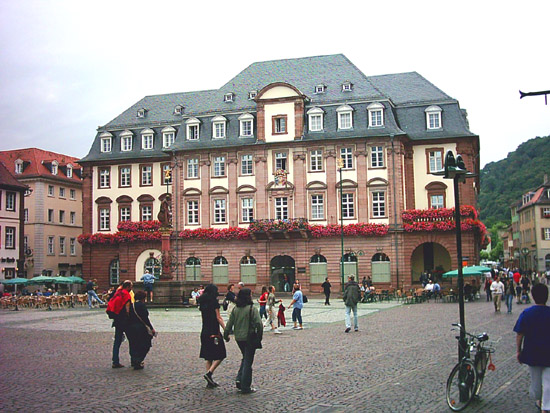 Heidelberg - Rathaus.